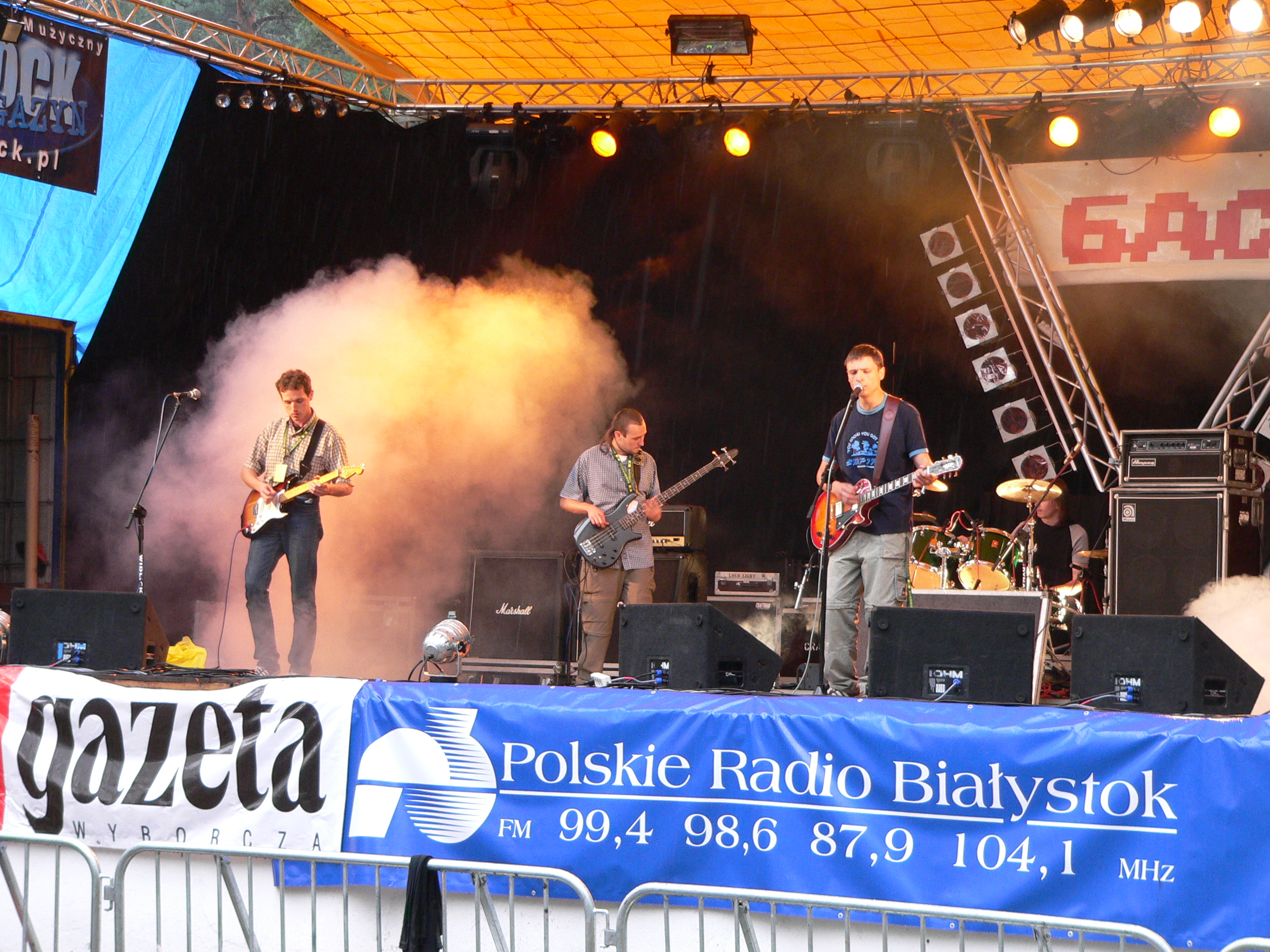 Беларуская (тарашкевіца): Гурт Hair Peace Salon сьпявае на фэстывалі “Басовішча” у 2005 годзе.